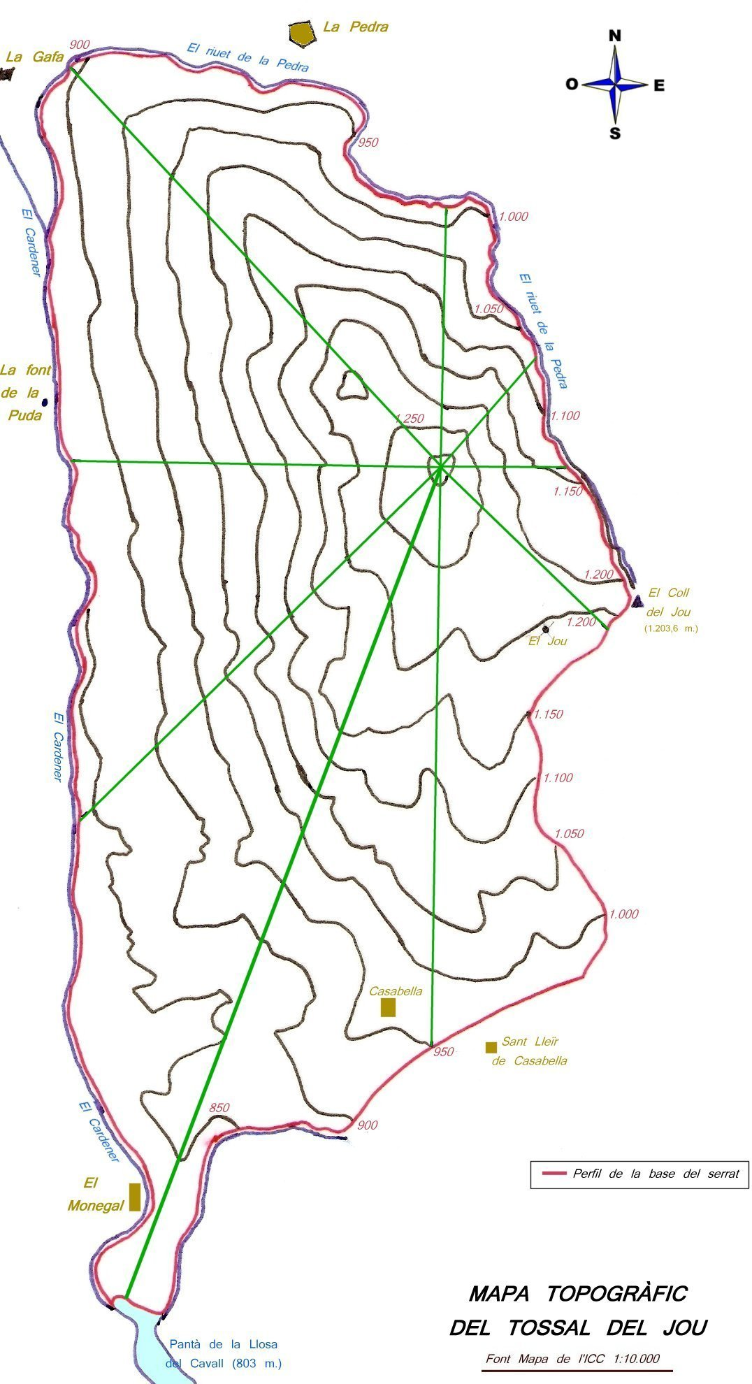 Esquema topogràfic del Serrat del Jou (La Coma i la Pedra, Solsonès)